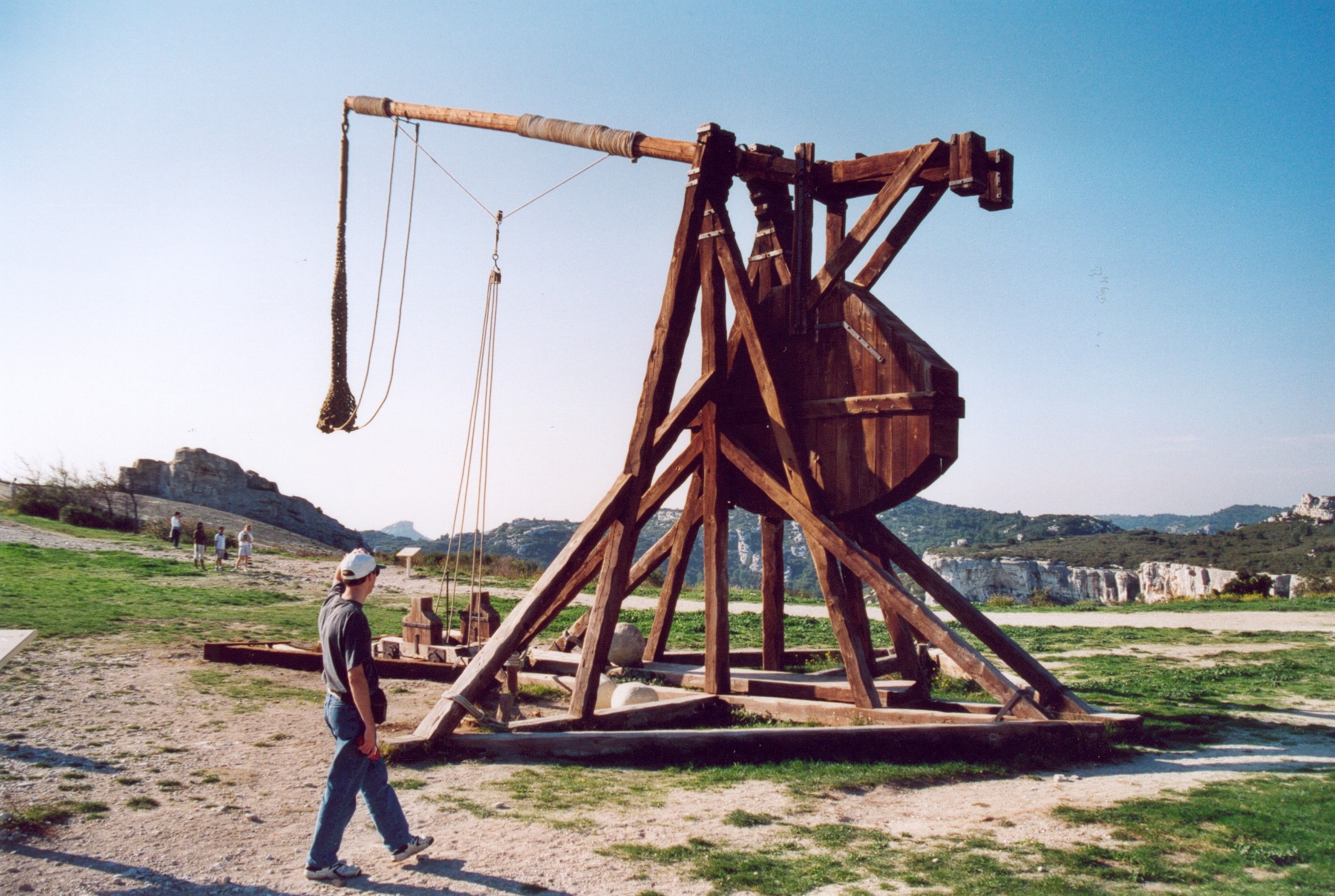 Les Baux-de-Provence Bouche du Rhône France Machine de guerre Photographie prise par Patrick GIRAUD